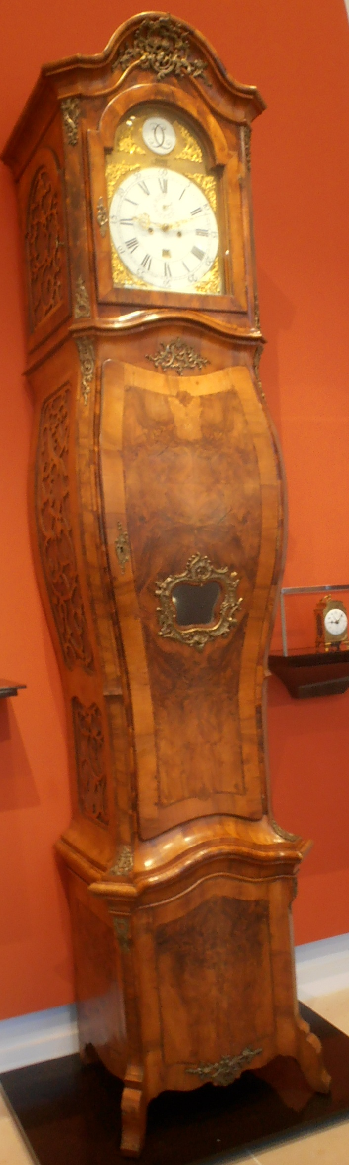 Bodenstanduhr mit Musikspielwerk von Johann Gottfried Kaufmann, Dresden 1774, in der Bogengalerie des Mathematisch-Physikalischen Salons im Zwinger Dresden